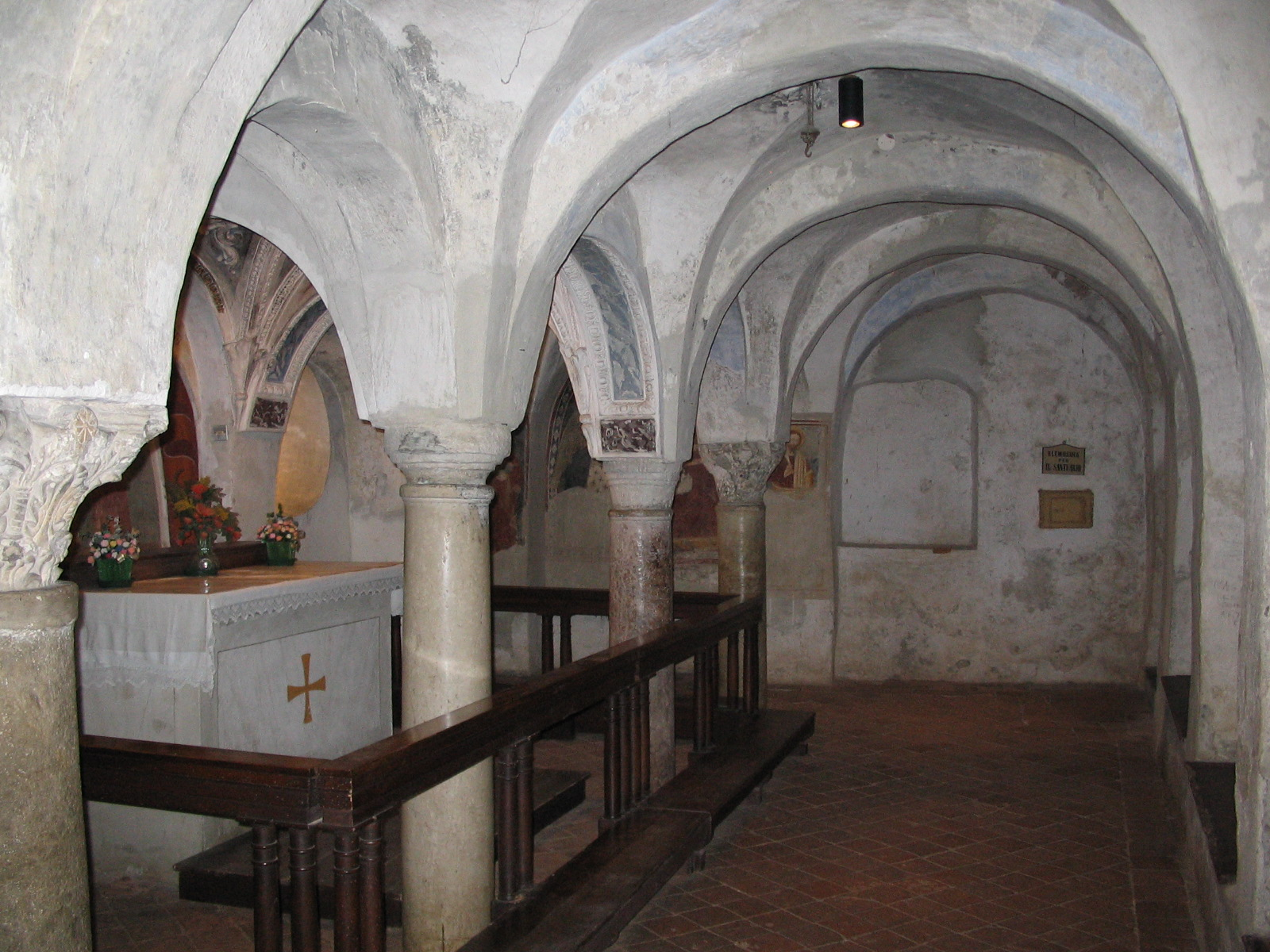 Autore Giorces. Almenno San Salvatore, la Pieve, particolare.